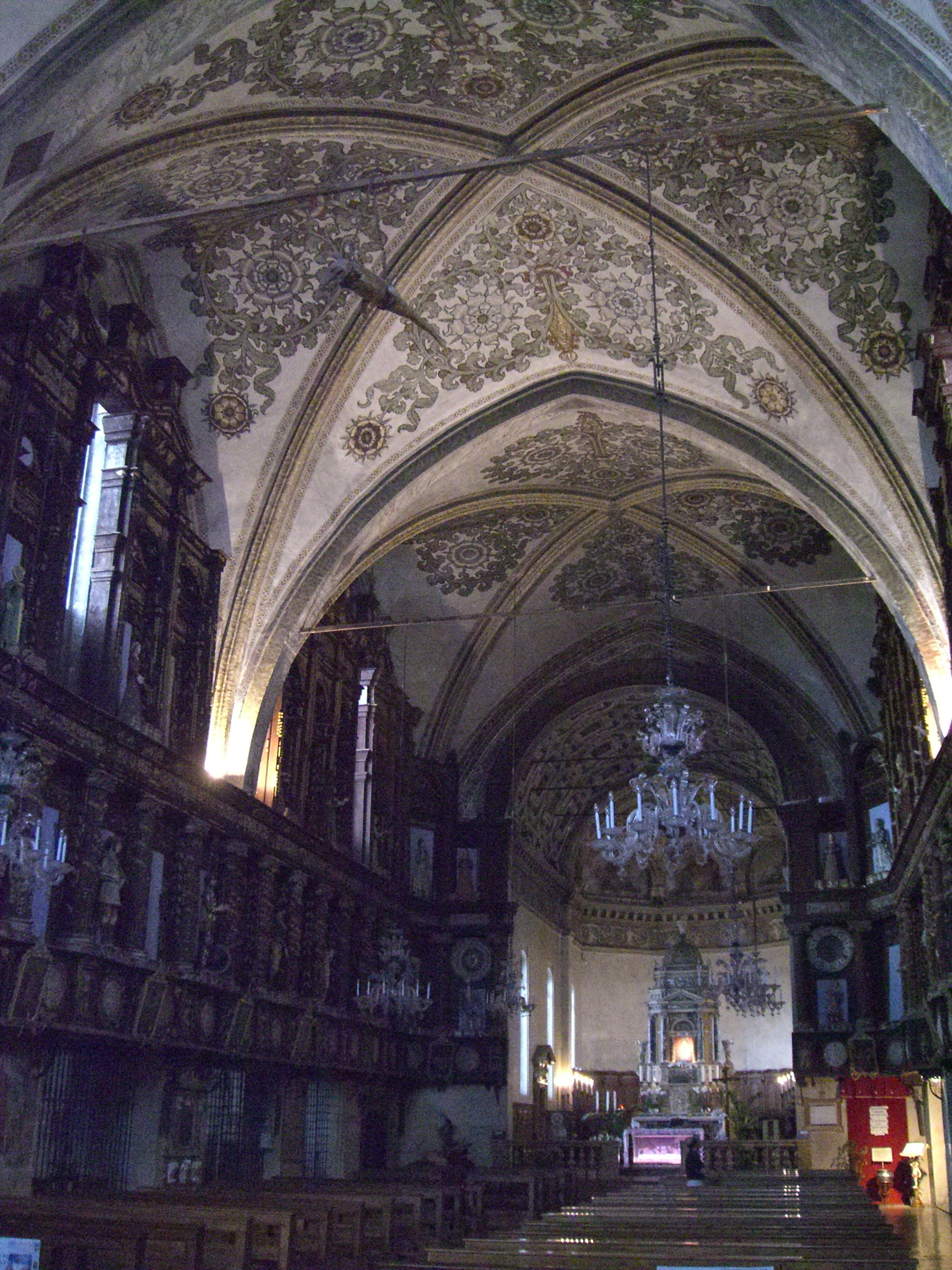 autore: Giovanni Bufalo